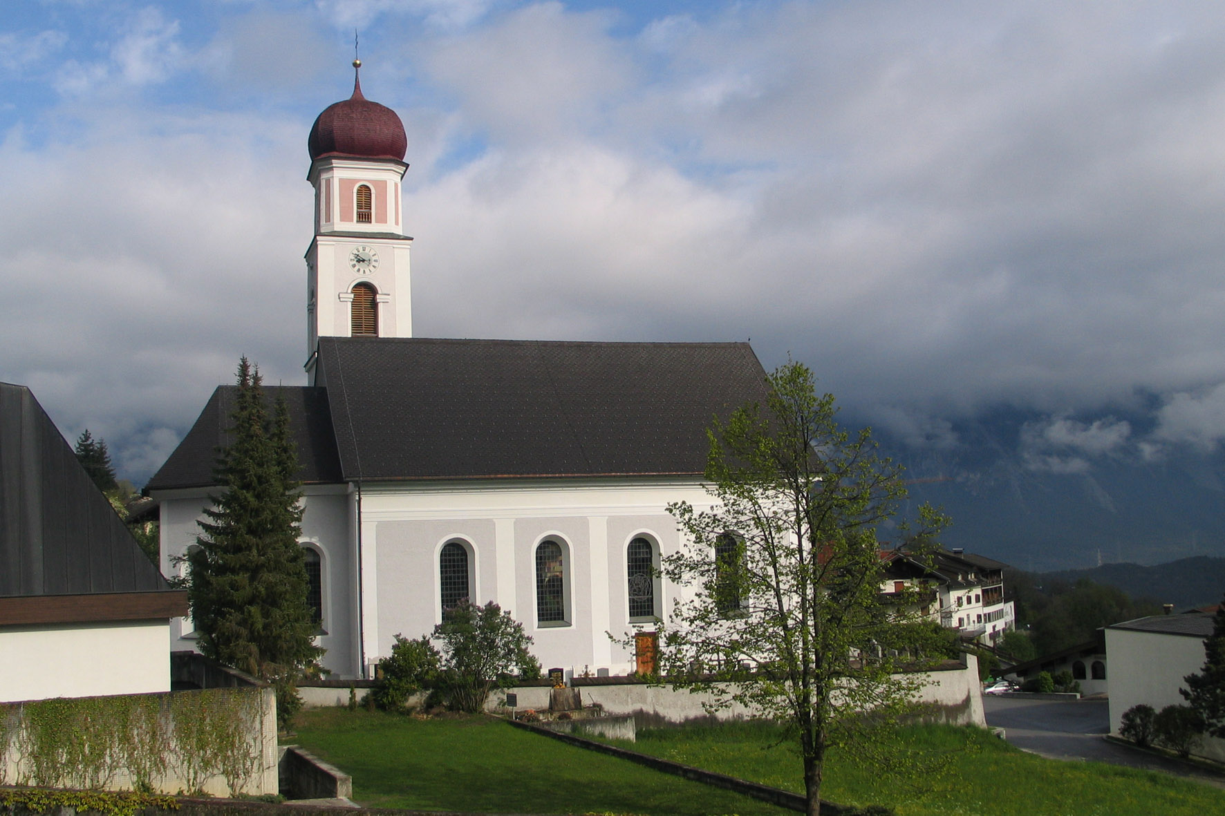 Kath. Pfarrkirche Mariae Heimsuchung und Friedhof